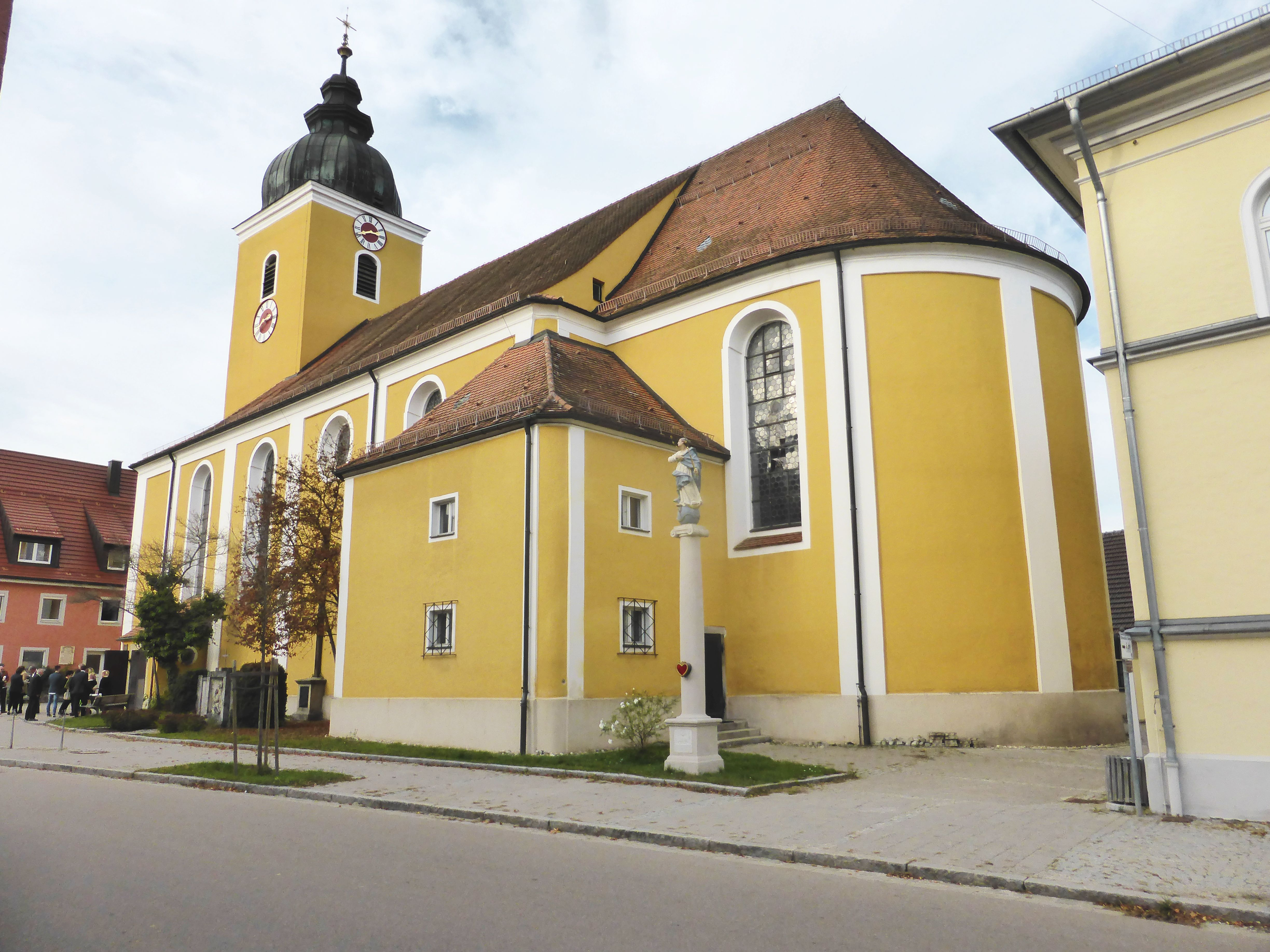 Pfarrkirche St. Peter und Paul (Beratzhausen)